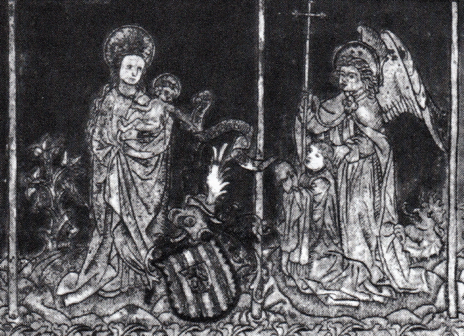 Epitaaf van Arnold I van Merode († 1487), proost van Onze Lieve Vrouwe in Aken, Onze Lieve Vrouwe in Maastricht, Sint-Joris in Wassenberg, enz. in de door hem gestichte Sint-Nicolaaskapel van de Dom van Aken. Links Sint-Matthias, de patroonheilige van de familie Merode. In het midden Maria met kindje Jezus en het wapenschild van Merode met als hartschild het wapen van Pietersem. Rechts de knielende Arnold van Merode met zijn bewaarengel en een demon.